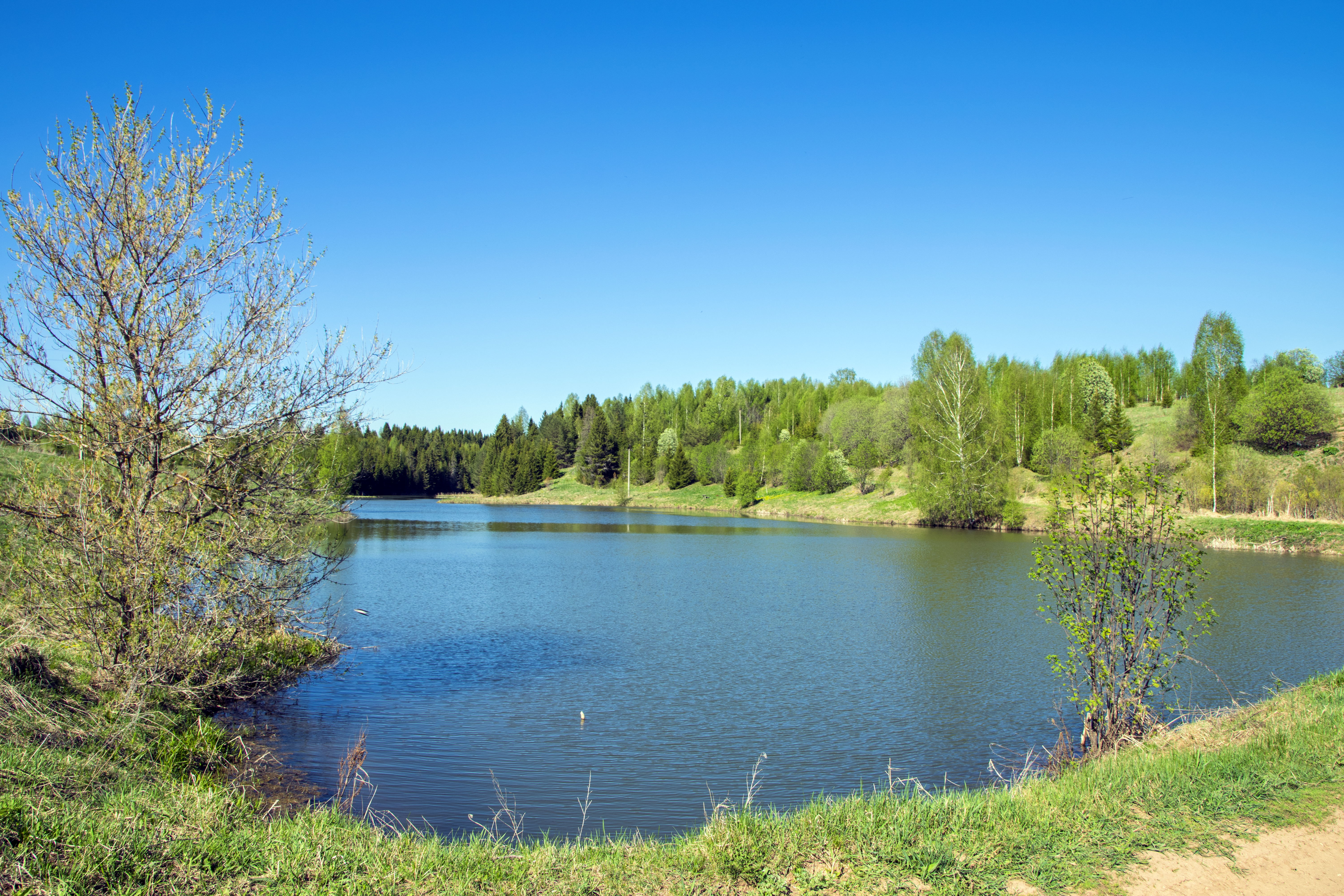 Историко-природный комплекс Ошеть, окрестности с. Ошеть, Сунский район, Кировская область This image is related to the protected area of Russia number 4310251